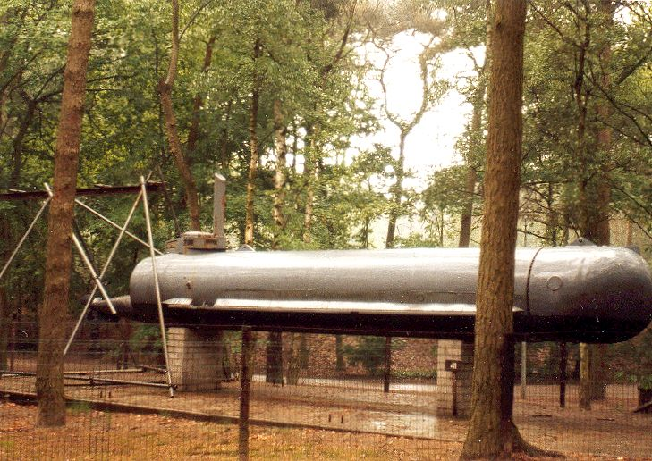 Deutsches Einmann-U-Boot Molch im Kriegs- und Widerstandskämpfermuseum der Niederlande (Overloon)